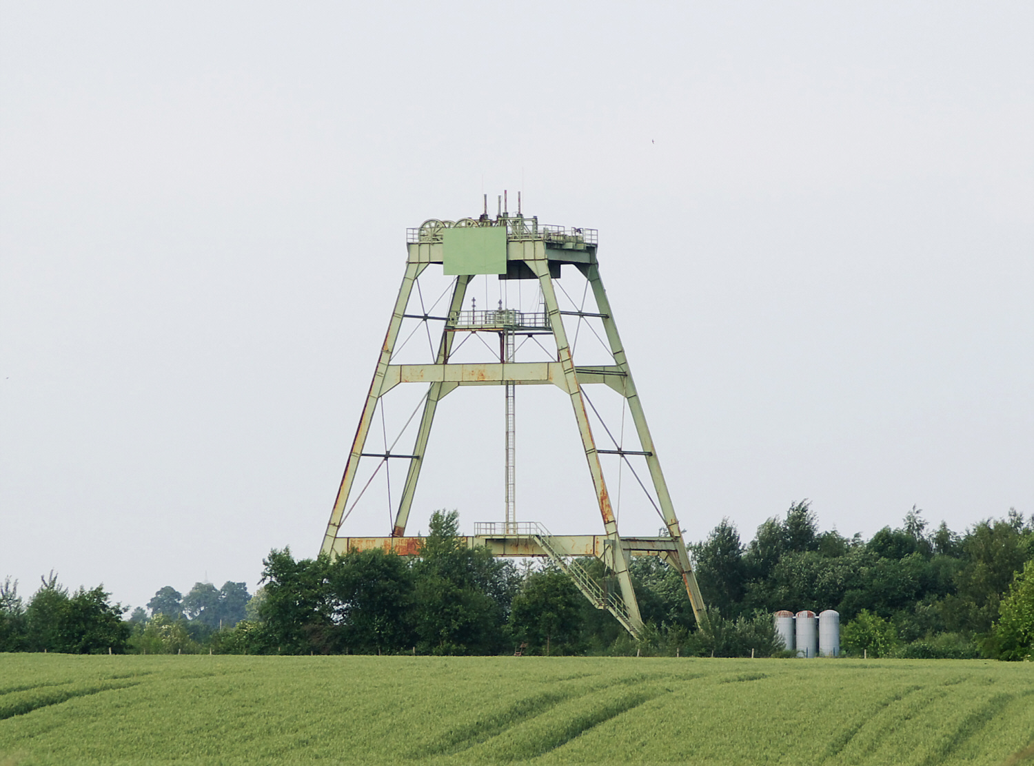 Probebohrungsgerüst Feld Donar 2008. Das Bergwerk Donar ist ein projektiertes Steinkohlebergwerk, geplant als Anschlußbetrieb des Bergwerks Ost in Hamm. Das Feld Donar wurde von der Zeche Heinrich Robert in Hamm von der stillgelegten Zeche Radbod übernommen. Heinrich Robert wurde seinerseits mit den Schachtanlagen (Neu-)Monopol und Haus Aden zusammengelegt.